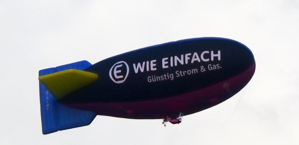 Blimp mit Werbung des Energieversorgers E wie einfach